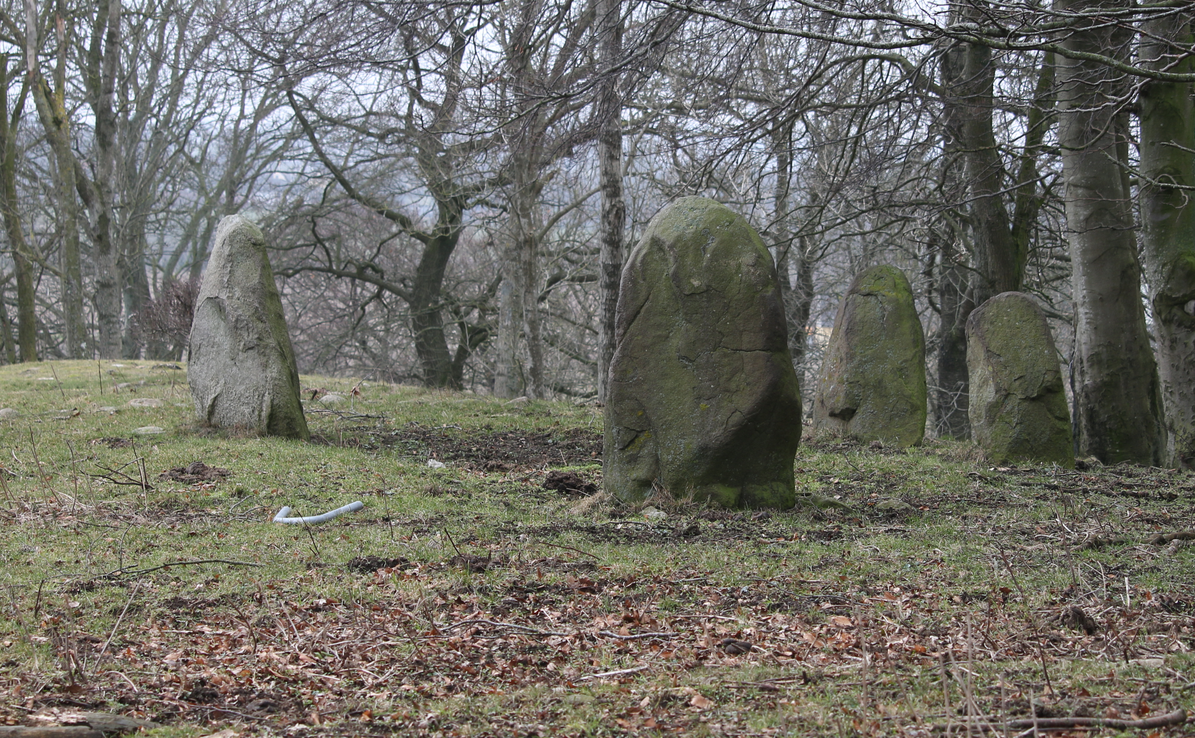 Smedstorp 5-1, Alabjärs skeppssättning 2